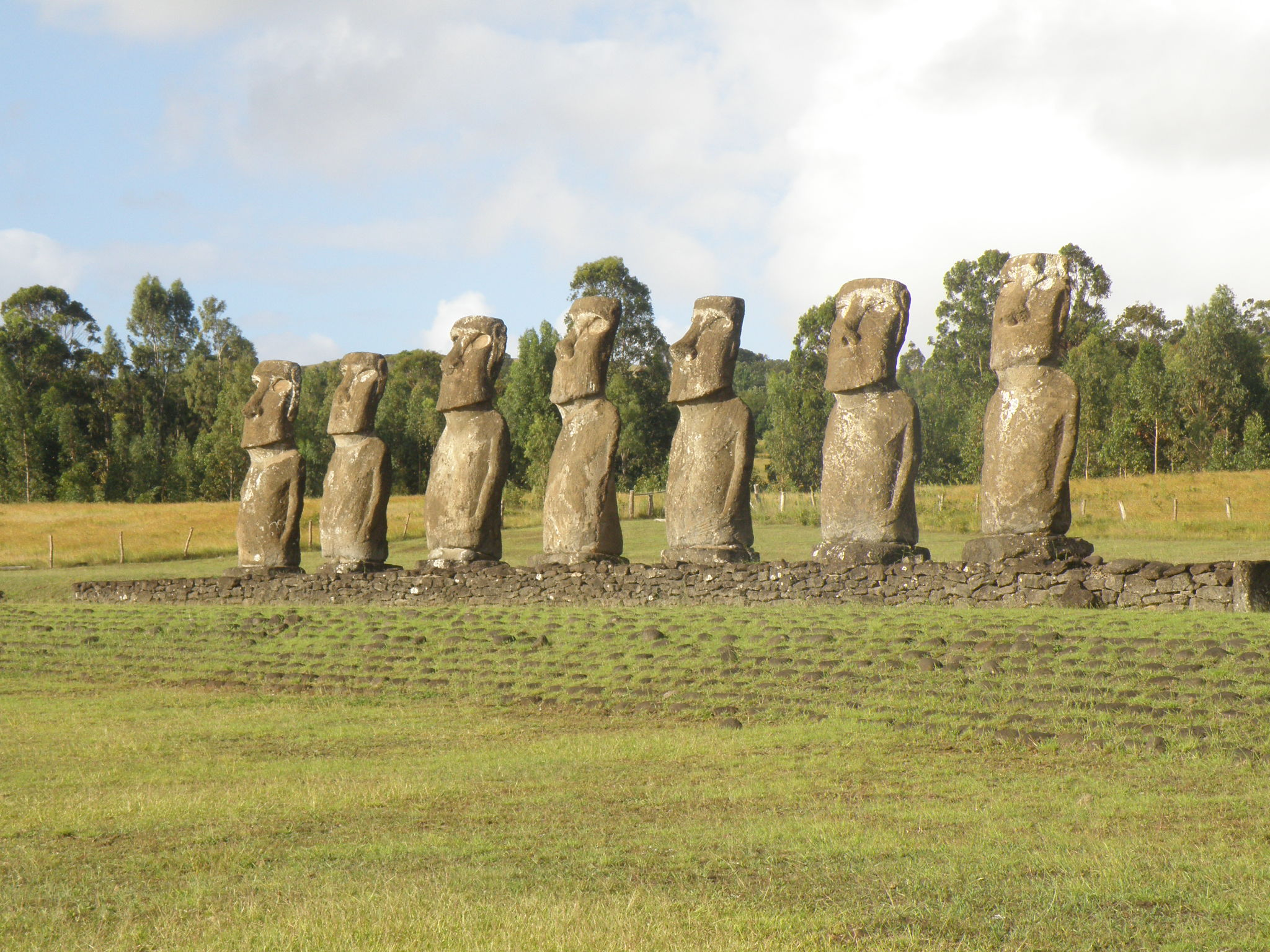 Rzeźby z wyspy Wielkanocnej - park Ahu a Kivi.